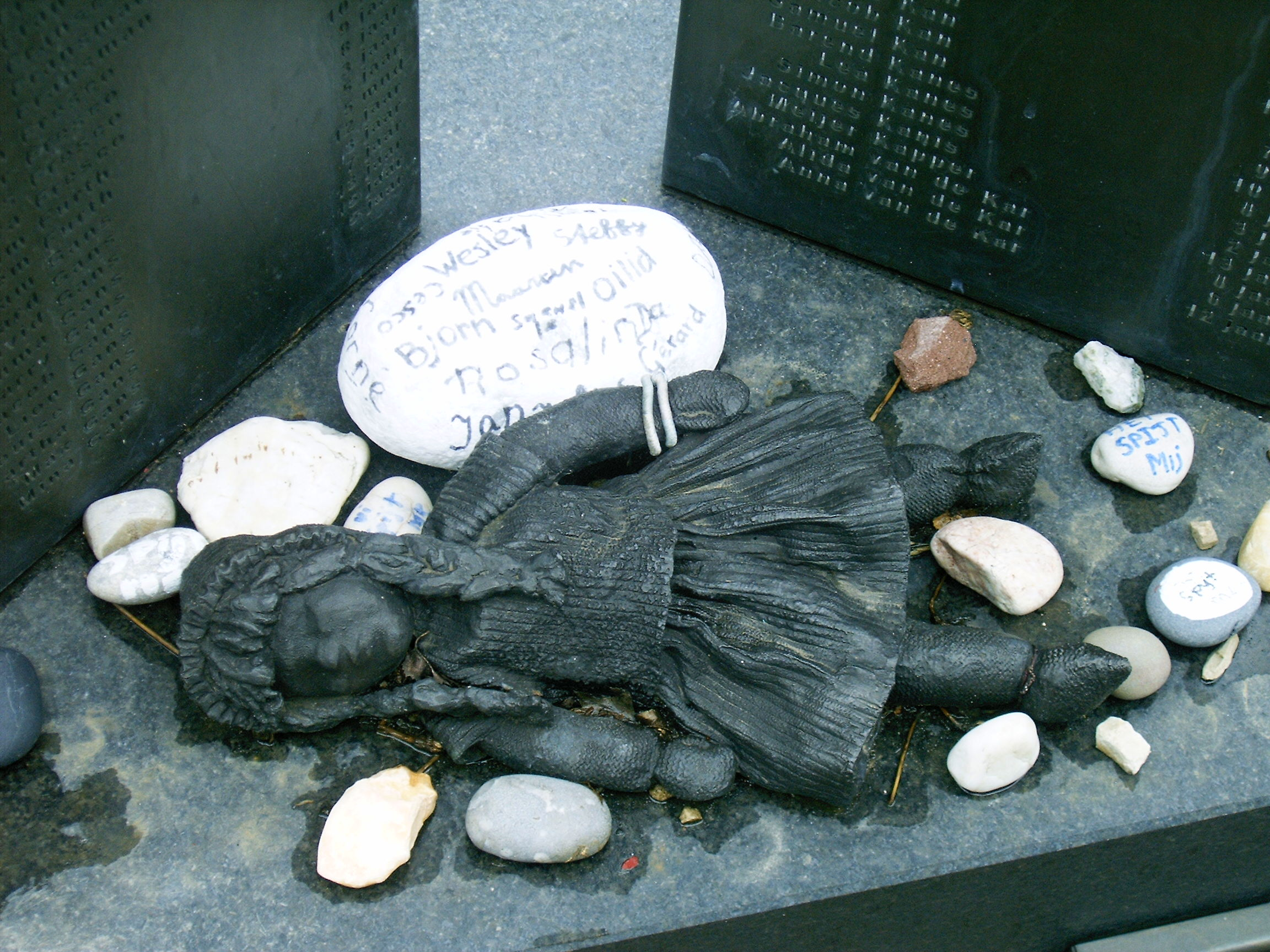 Monument der verloren kinderen, Detail speelgoed